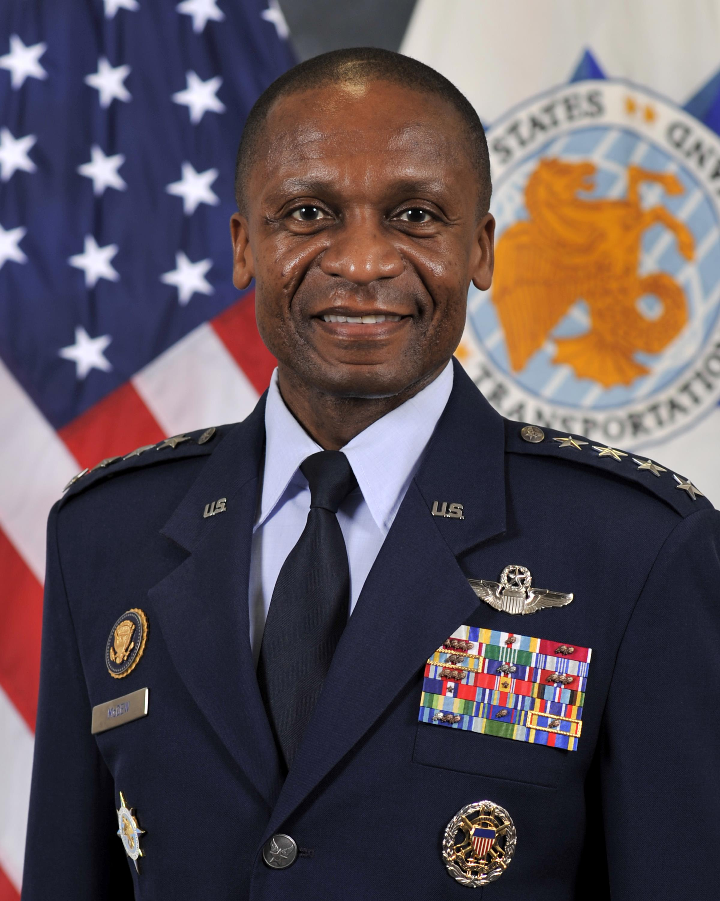 Commander, USTRANSCOM